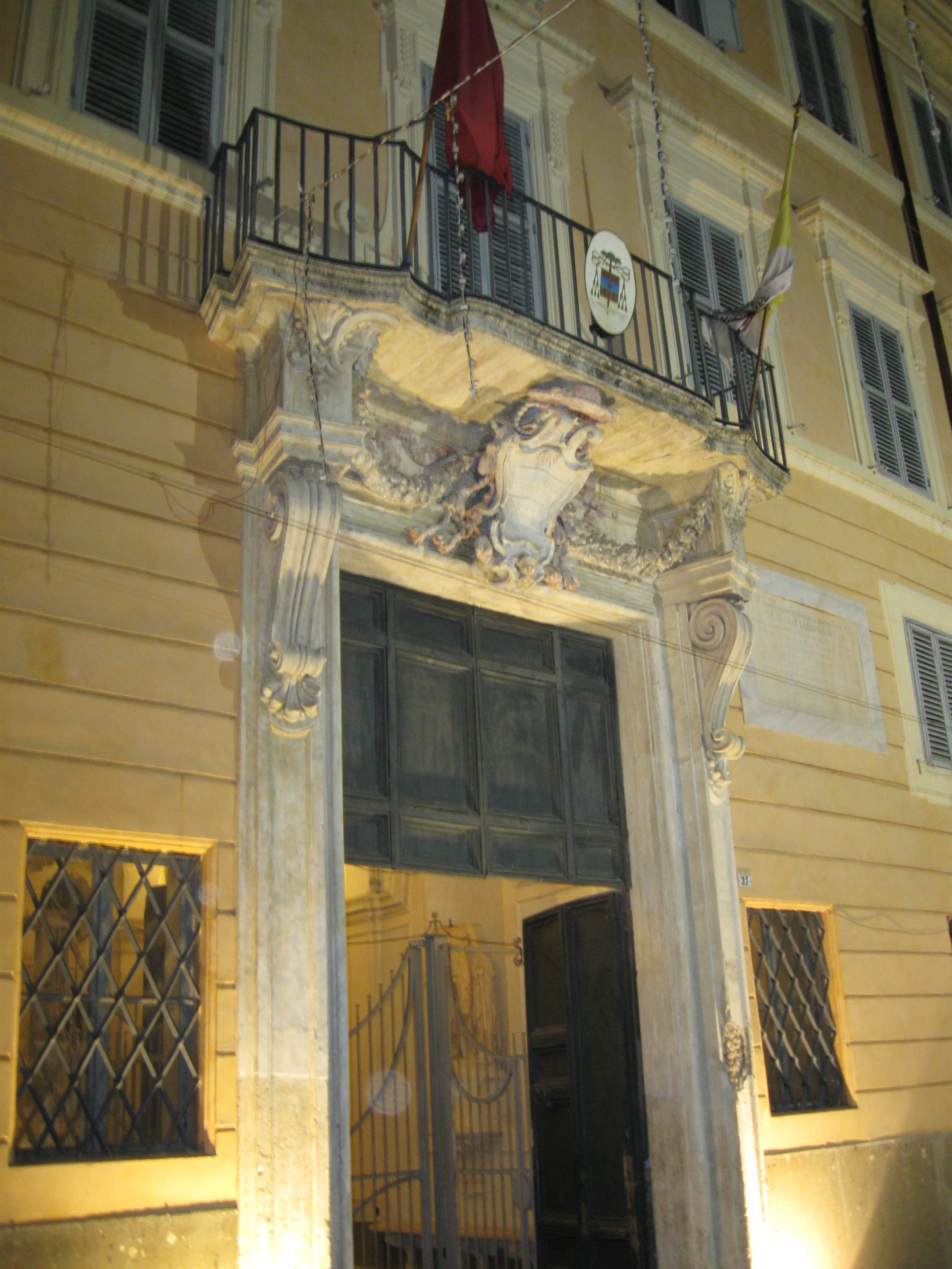 Il portale del Palazzo Vescovile di Albano Laziale